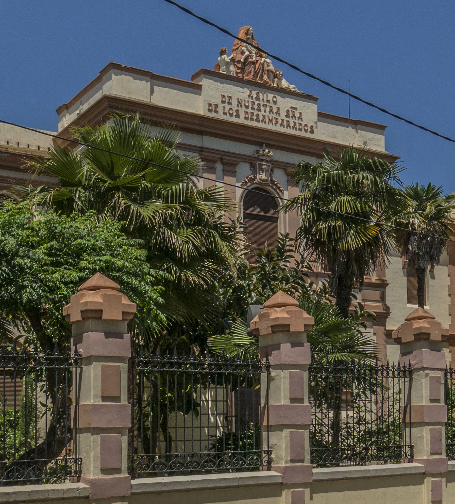 Carcaixent és una ciutat del País Valencià, que es troba a la comarca de la Ribera Alta.